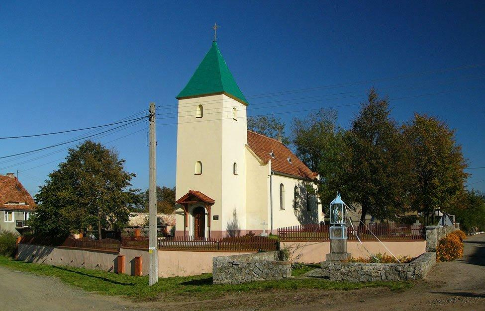 Kościół i kapliczka - pomnik w Siemidrożycach.